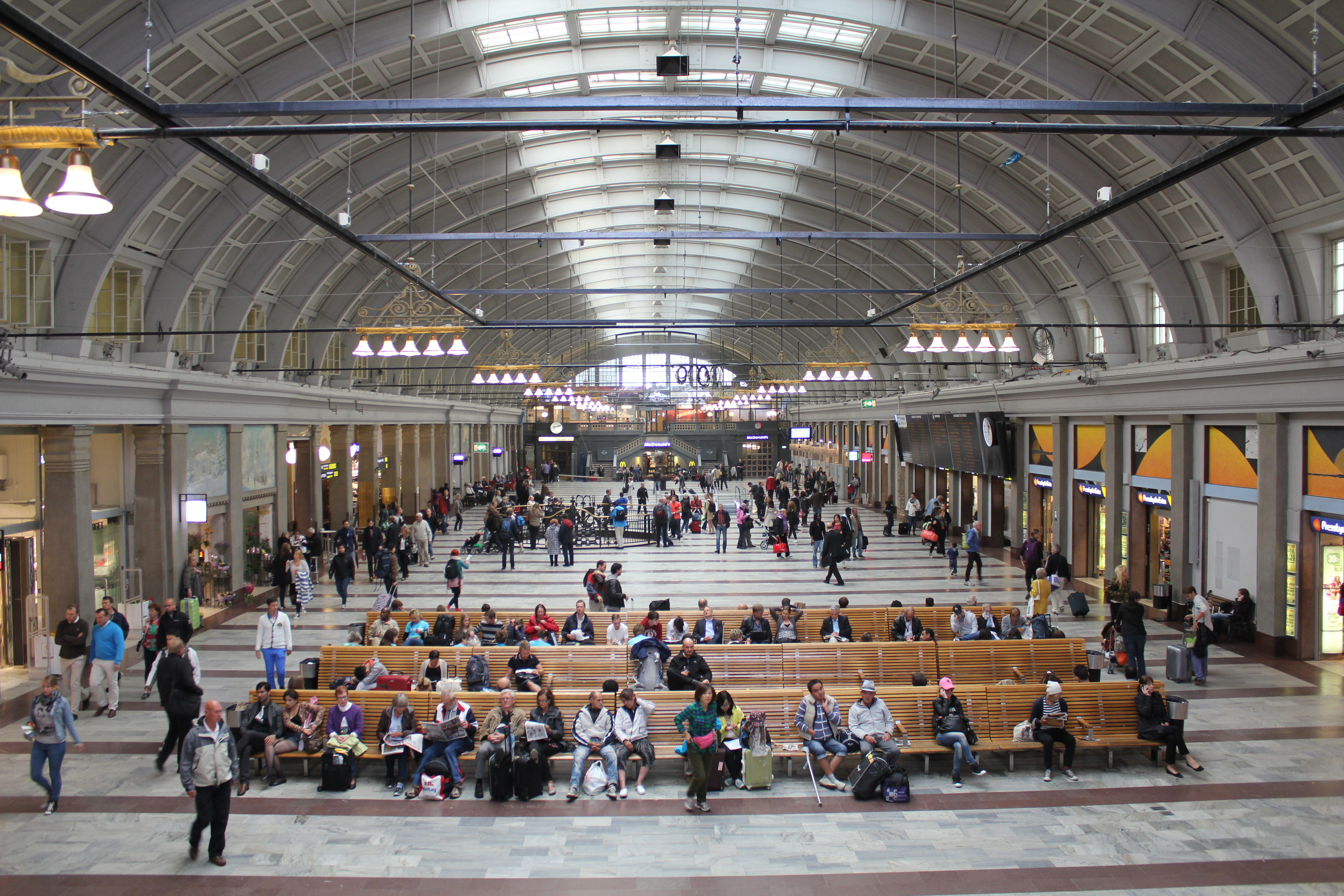 Stockholms centralstation. Interiörbild.